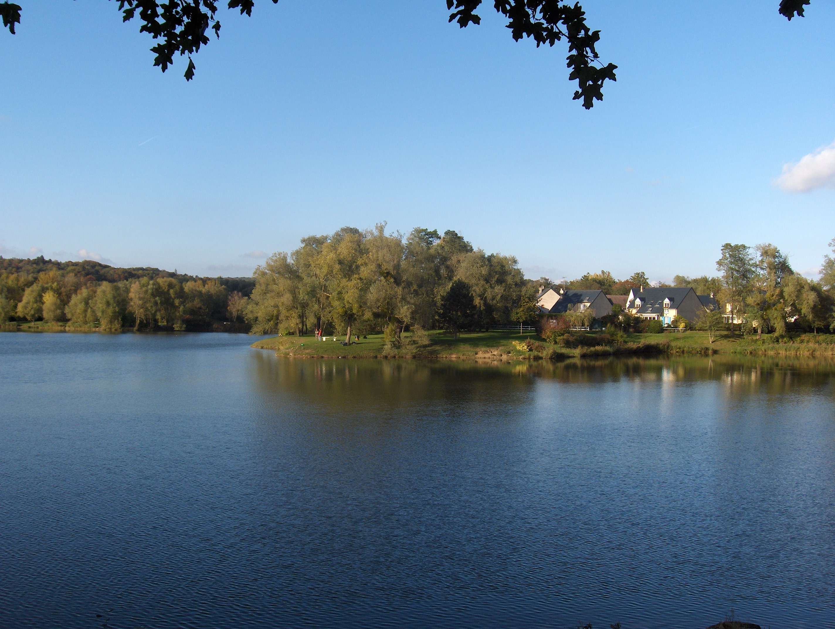 Etang du quartier résidentiel de la Garenne à L'Isle-Adam (Val-d'Oise)